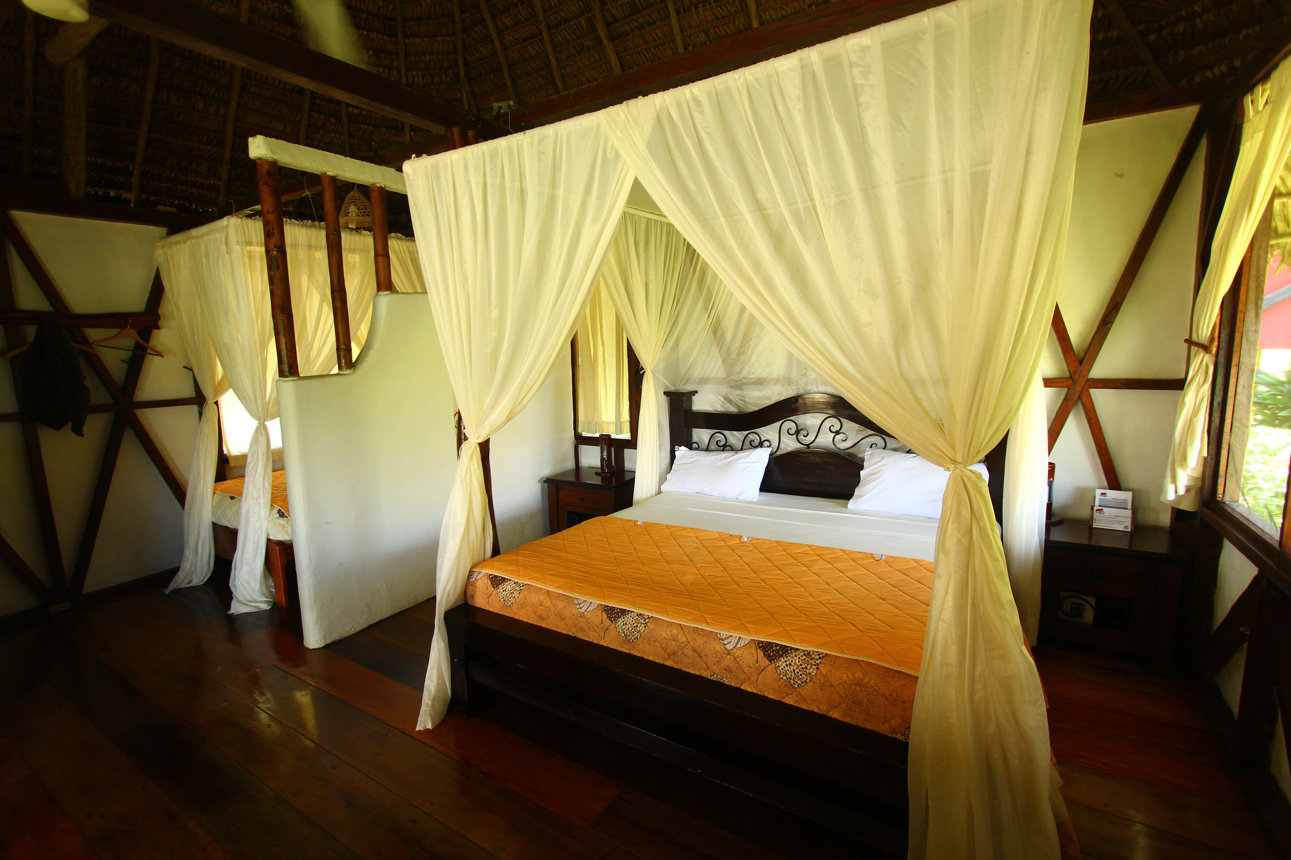 Cabaña de tipo estandard